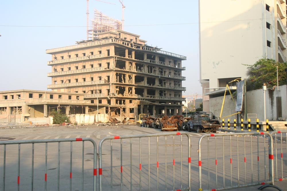 Blick von Westen auf die abgesperrte Straße, in der die Autobombe gezündet wurde, die Rafiq Al-Hariri tötete. Das Gebiet wurde nach dem Anschlag bis zum Abschluss der internationalen Untersuchung abgesperrt. Die Fahrzeuge befinden sich nicht mehr in den Positionen wie unmittelbar nach dem Anschlag.